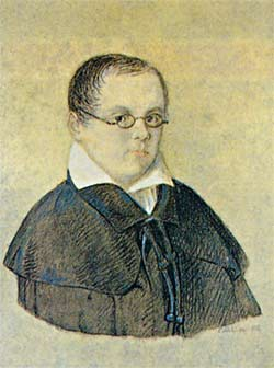 Anton Delvig (1798-1831), poeta russo